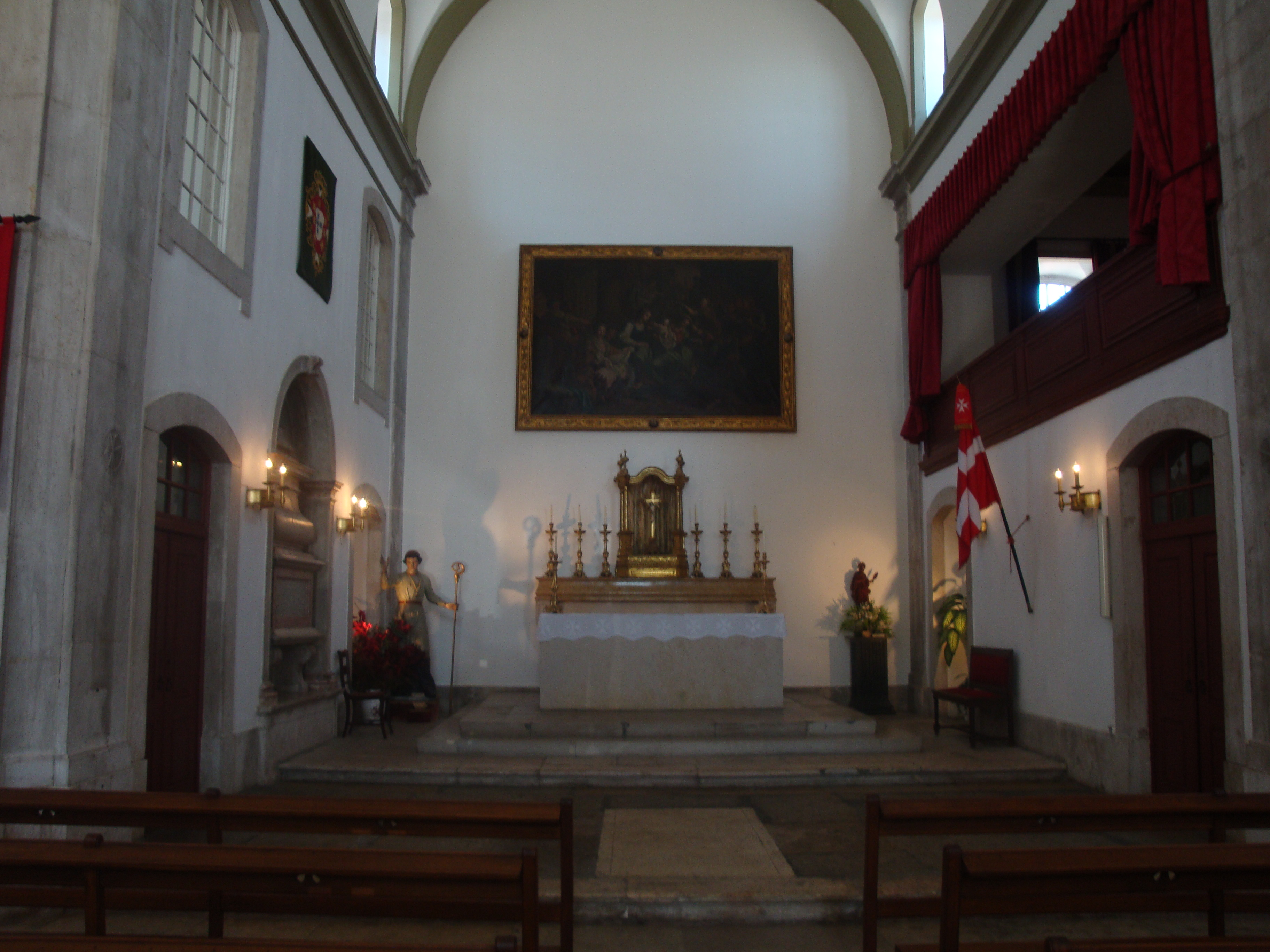 interior da Igraja de Santa Luzia, em Lisboa